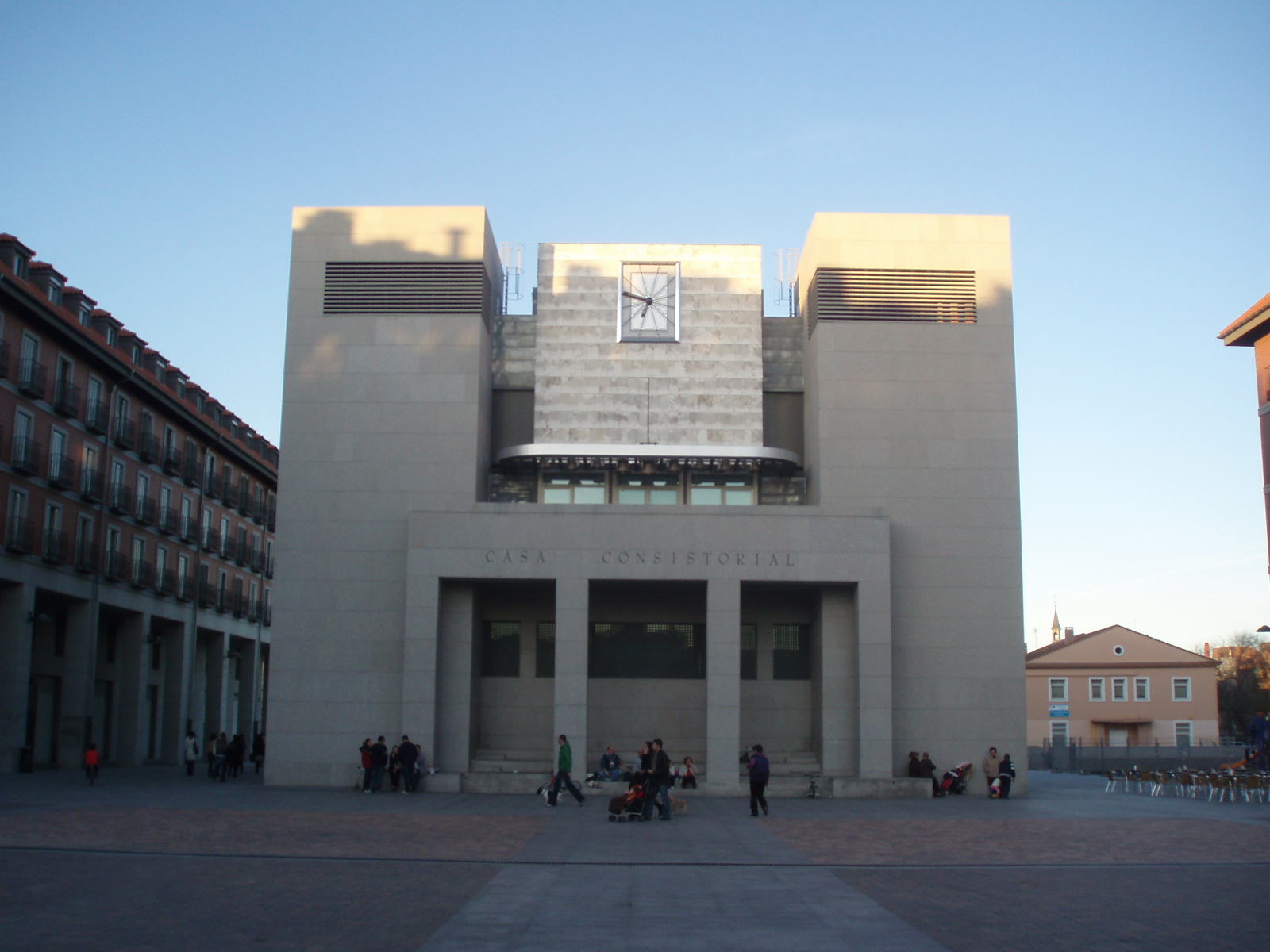 Casa Consistorial de Leganés, situada en la Plaza Mayor de la ciudad